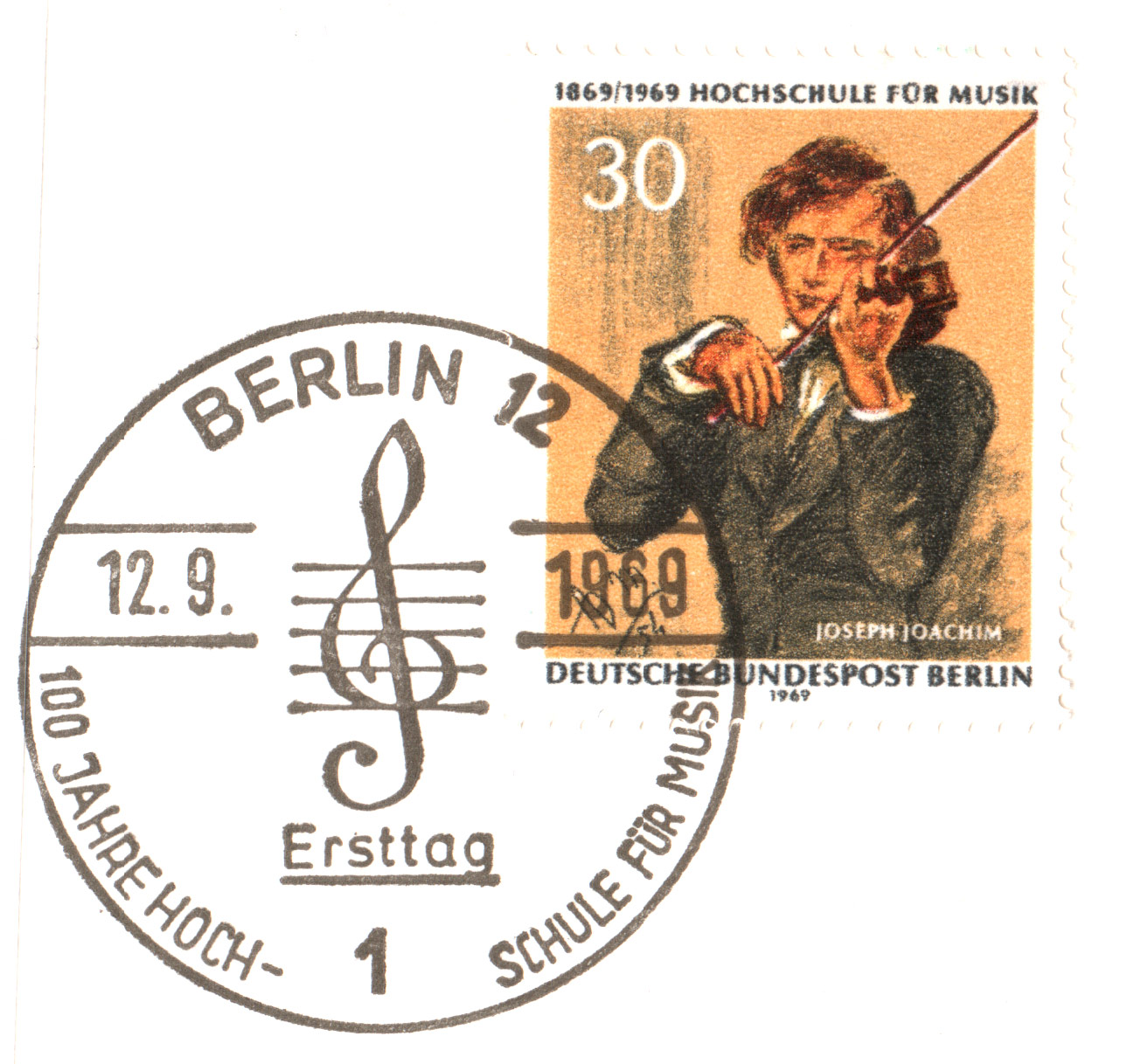 Deutsche Bundespost Berlin 1869/1969 Hochschule für Musik - Joseph Joachim Ausgabepreis: 30 Pfennig First Day of Issue / Erstausgabetag: 12.09.1969 Auflage: ? Stück Entwurf: Adolph Menzel Druckverfahren: ? Michel-Katalog-Nr: 347